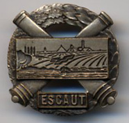 Insigne secteur fortifié de l'Escaut 2eme modèle)